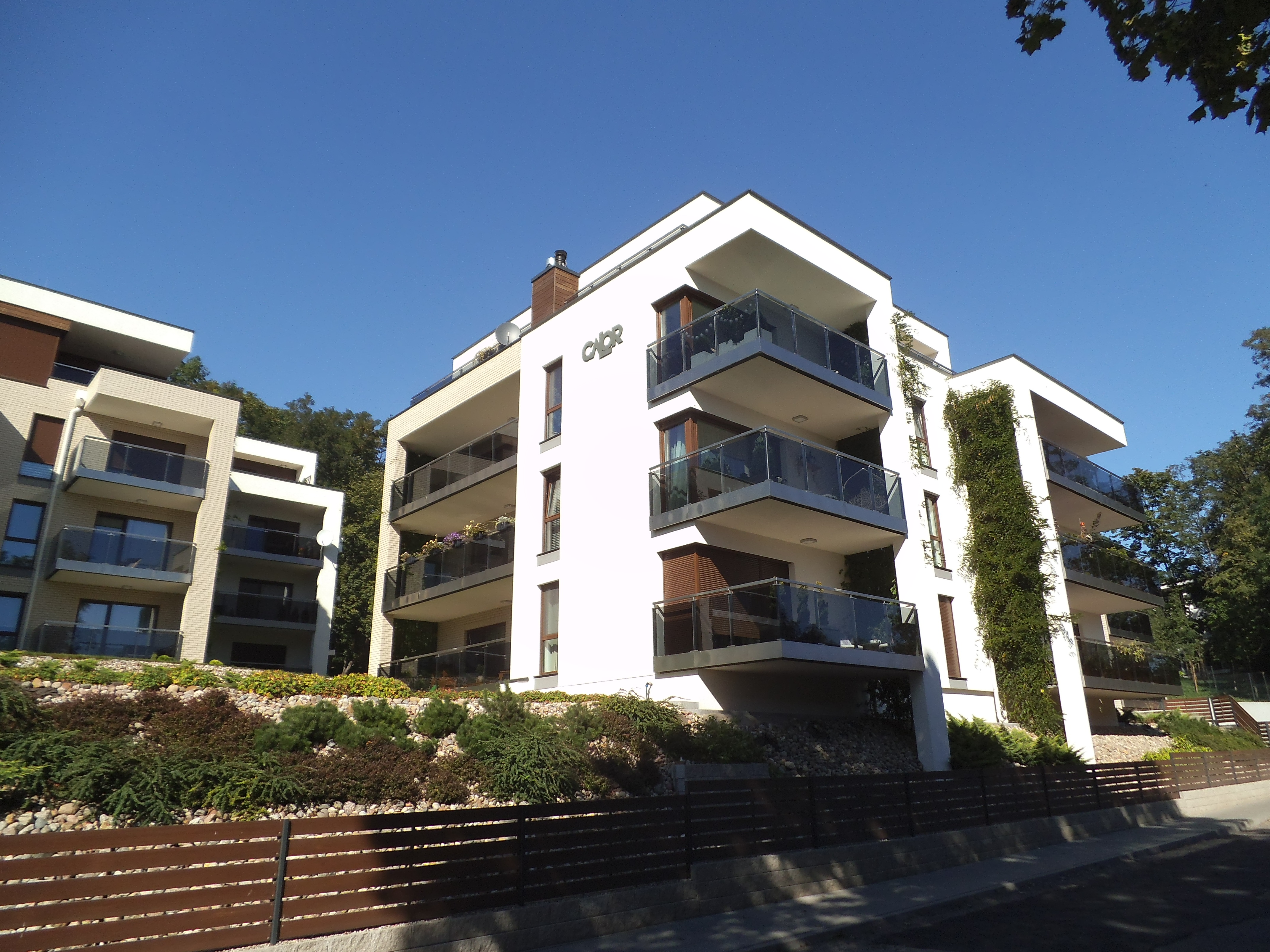 Fragment zabudowy wielorodzinnej przy ulicy Winnica w Toruniu